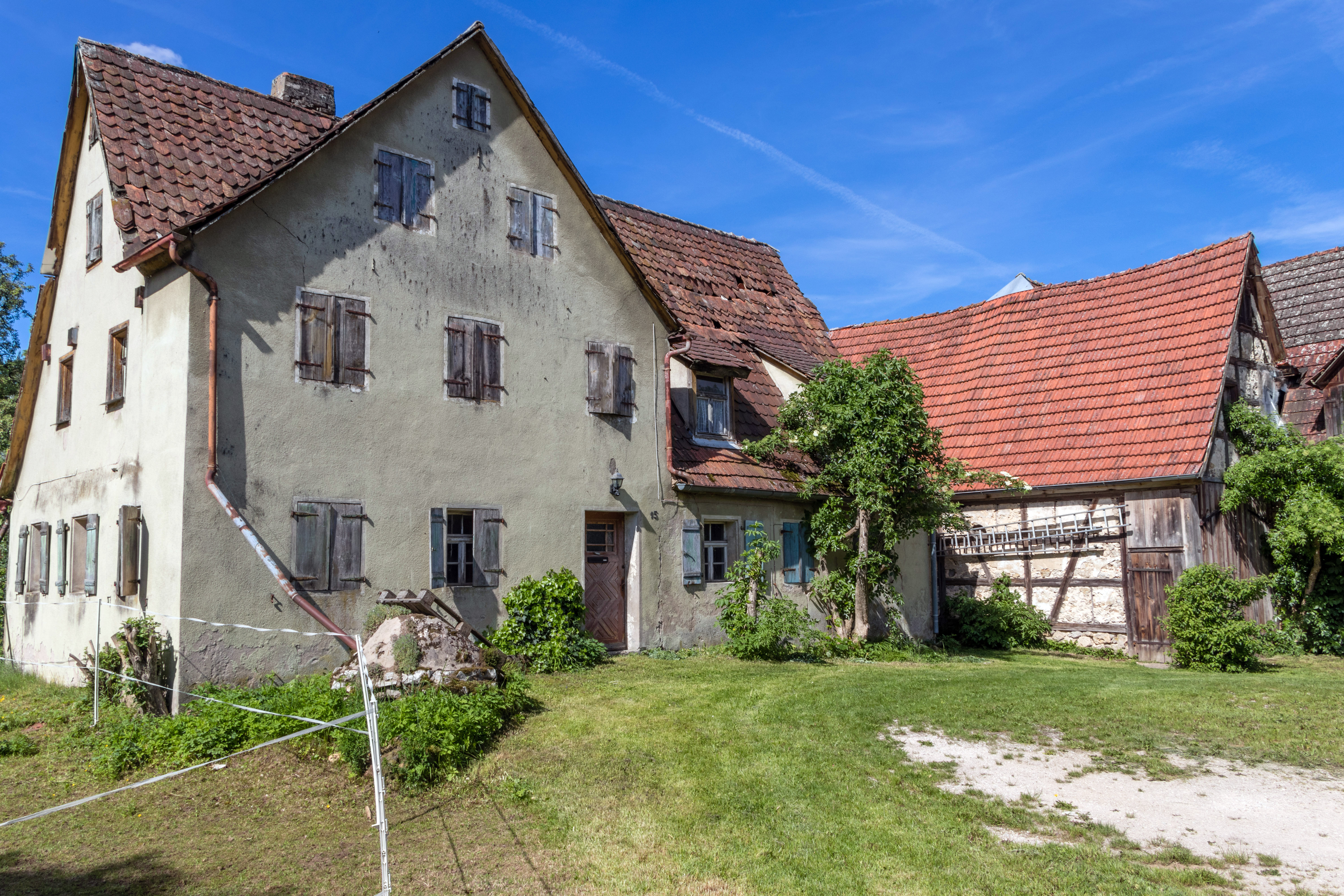 Molsbach, Altes Anwesen